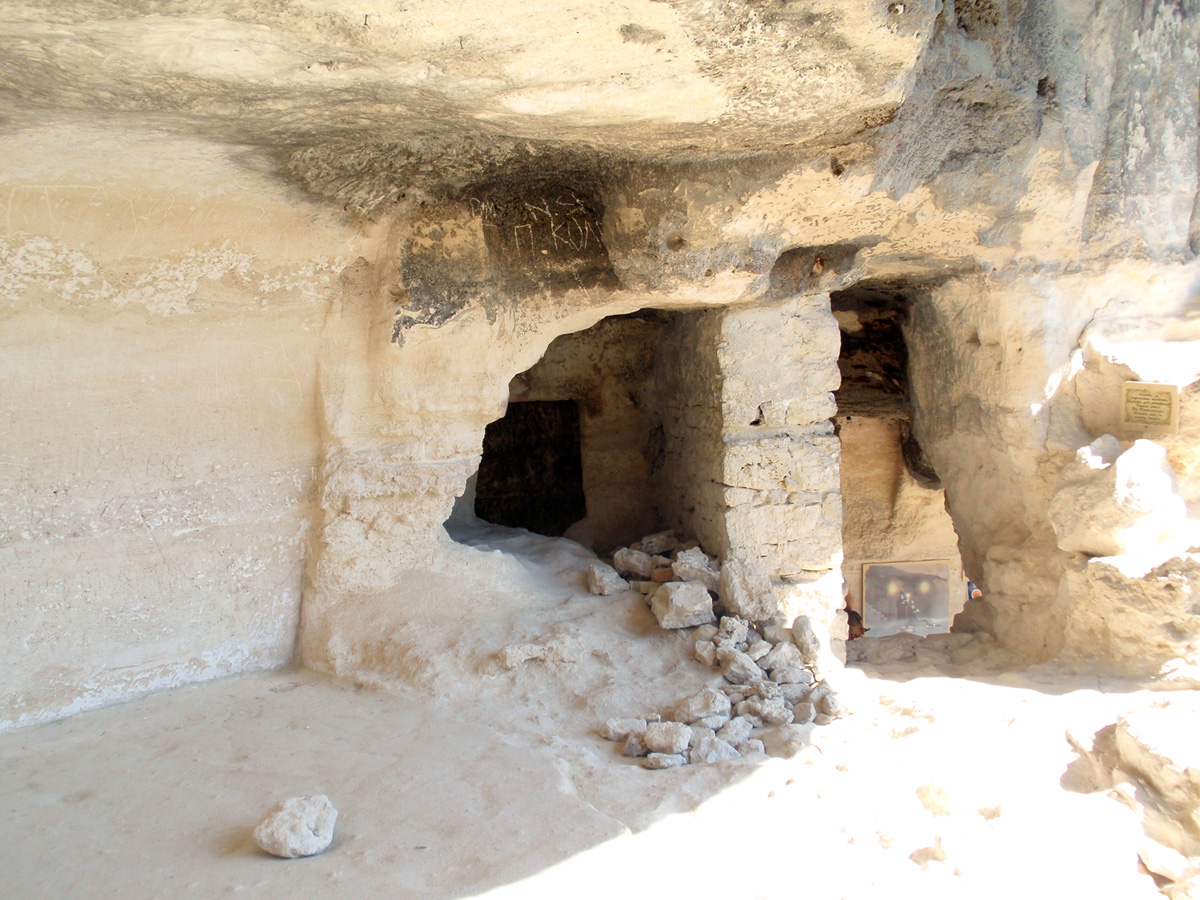 В середині монастиря Аладжа